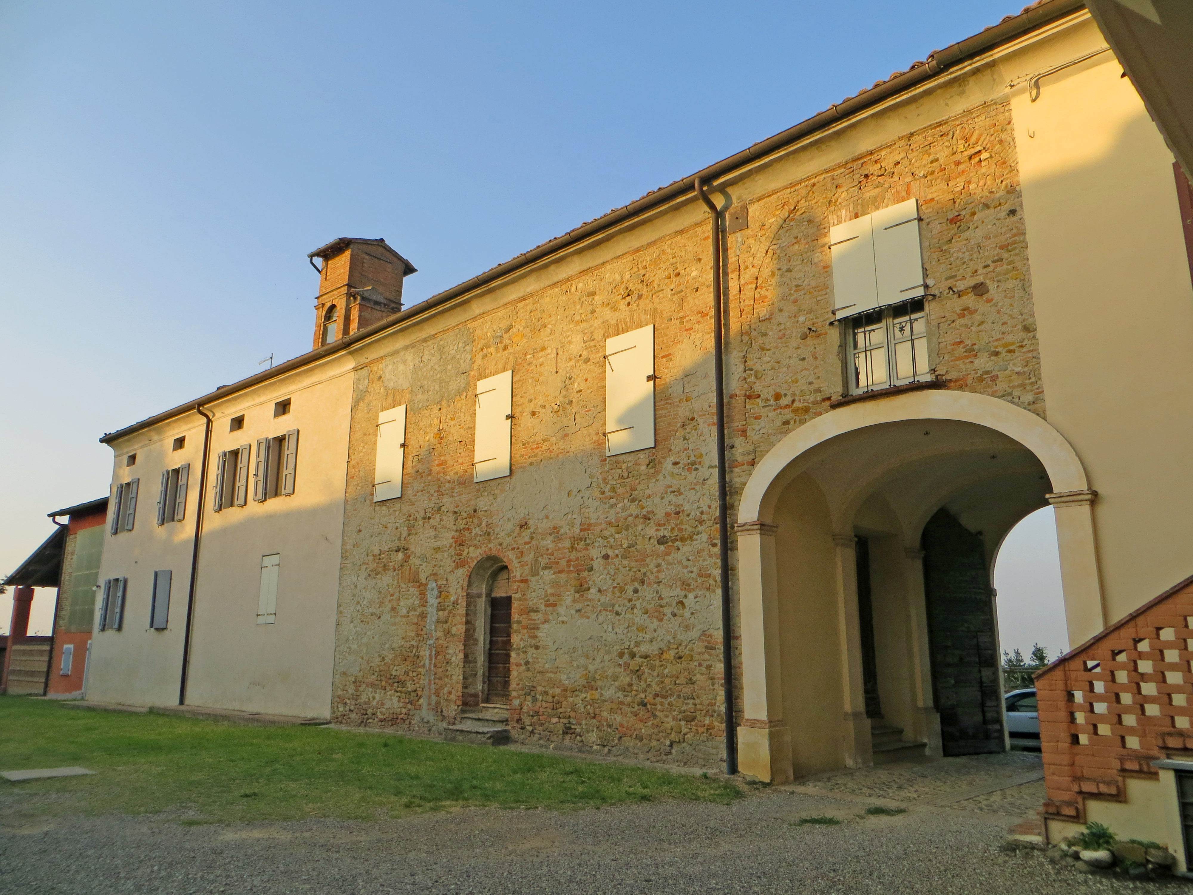 Lato nord della corte del castello di Segalara This is a photo of a monument which is part of cultural heritage of Italy.